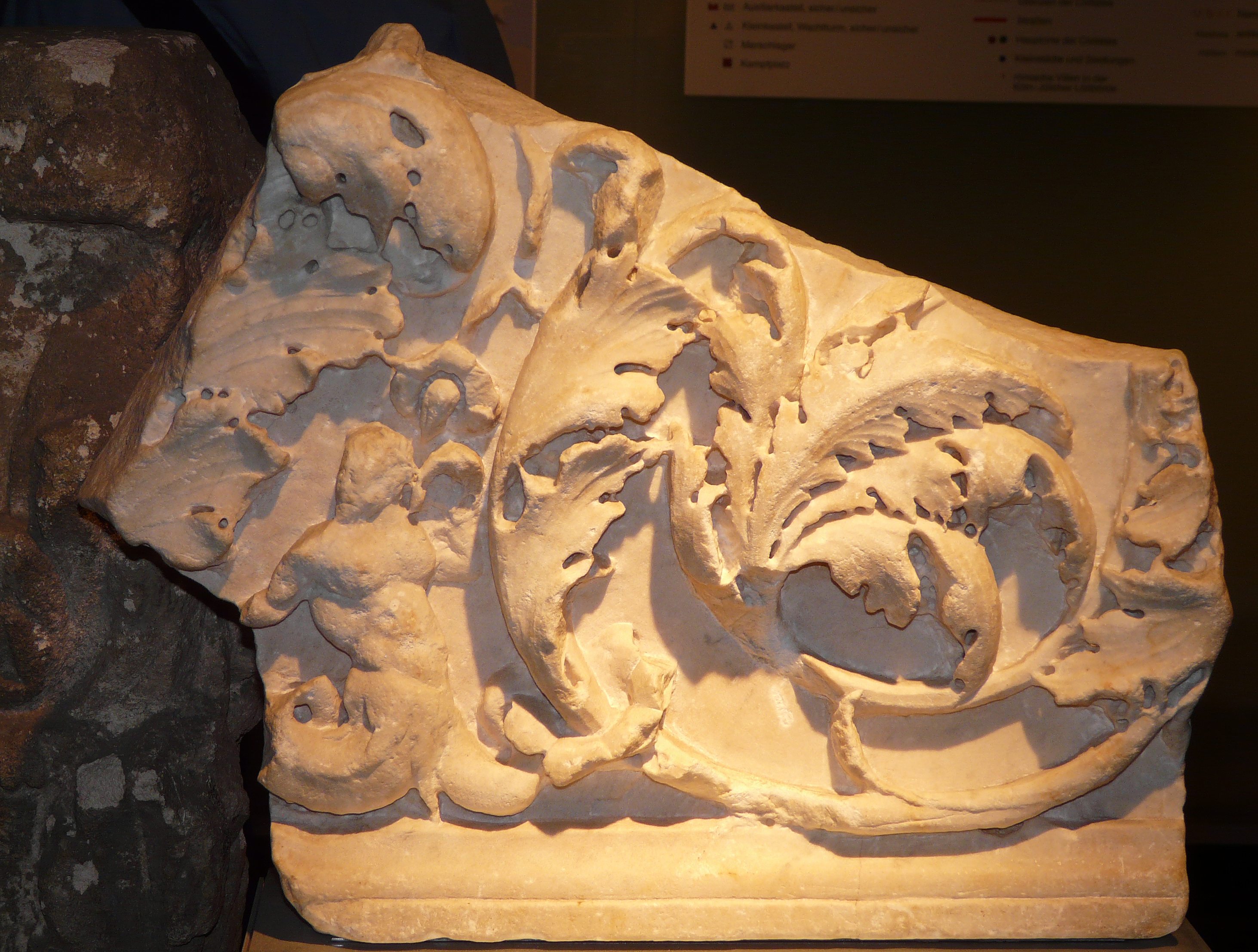 Architekturteil in den Ausstellungsräumen des sog. Ubiermonuments in Köln